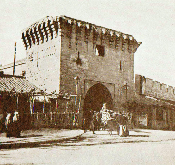 Ancienne porte Limbert d'Avignon détruite en 1896